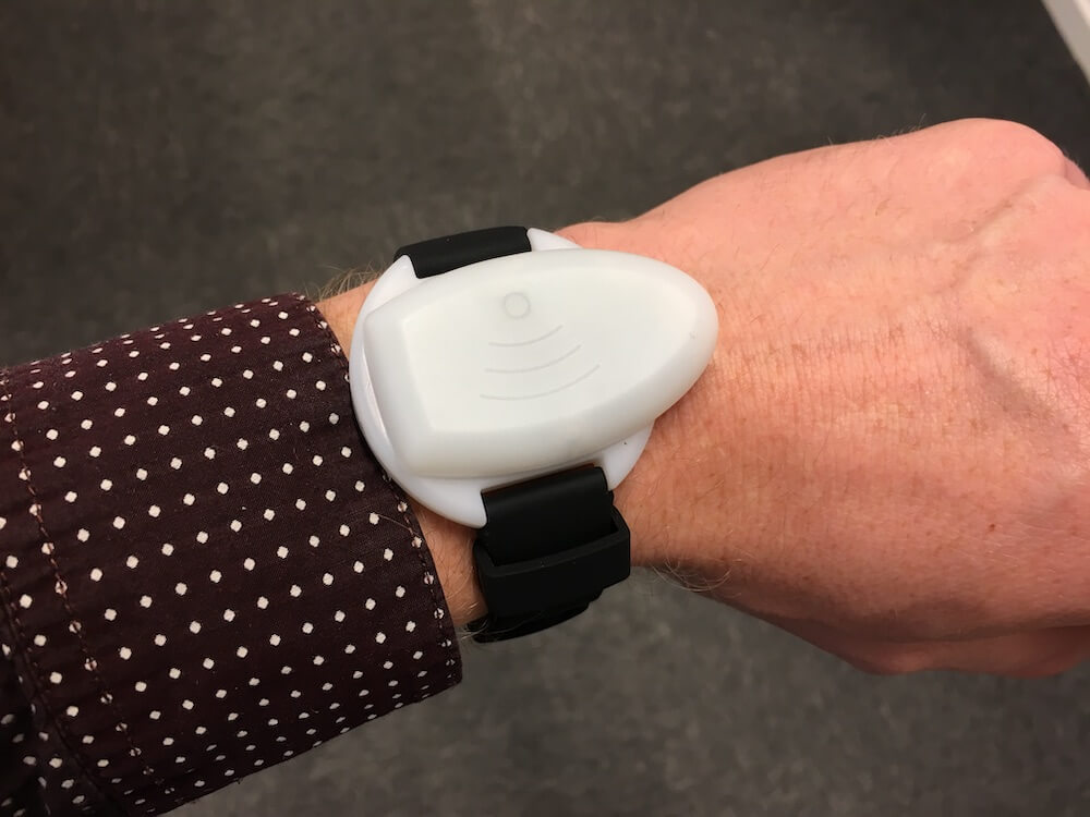 Der sidder et accelerometer i sensoren, som hele tiden sender data til epilepsialarmen. Sensoren bæres om armen som et ur, da armen bevæger sig kraftigt ved epileptiske kramper.